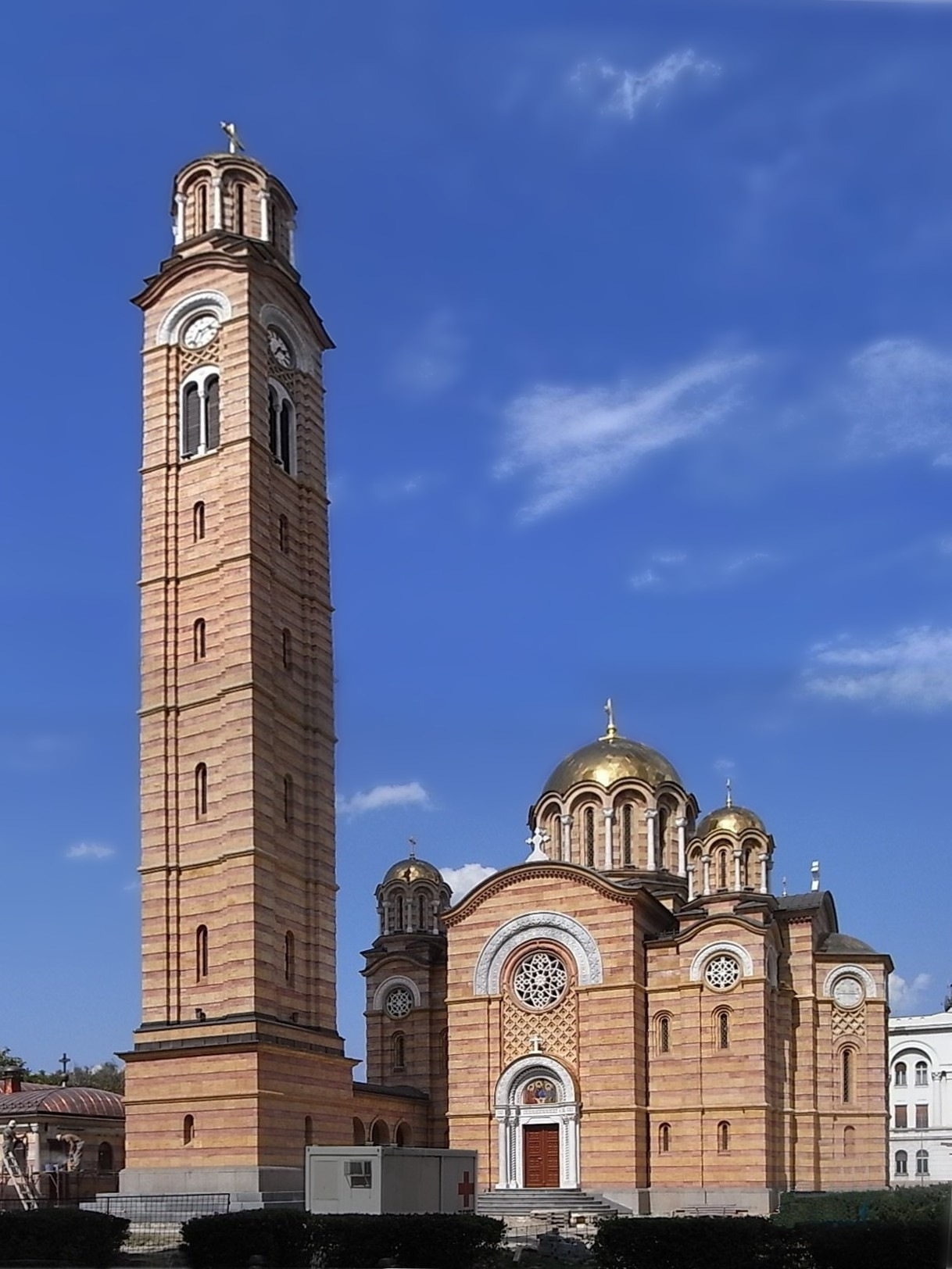 Saborni hram Hrista Spasitelja u Banjoj Luci